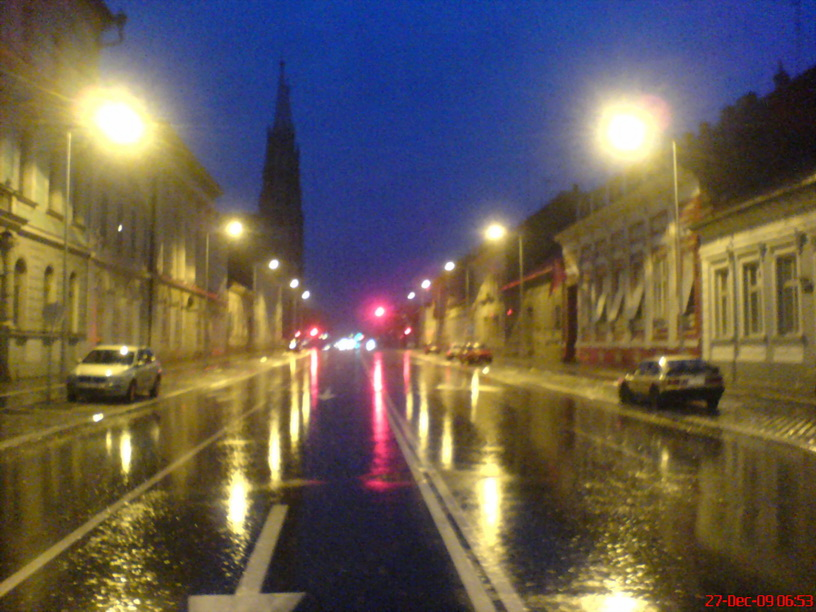 Киша у булевару Жарка Зрењанина Licensing